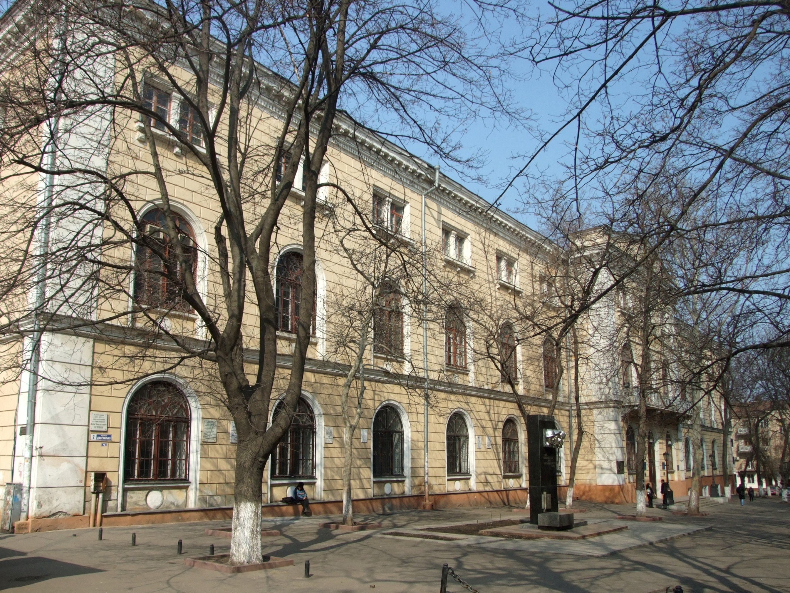 Будівля Рішельєвського ліцею (пізніше - Новоросійського університету), 1852 – 1857 рр.